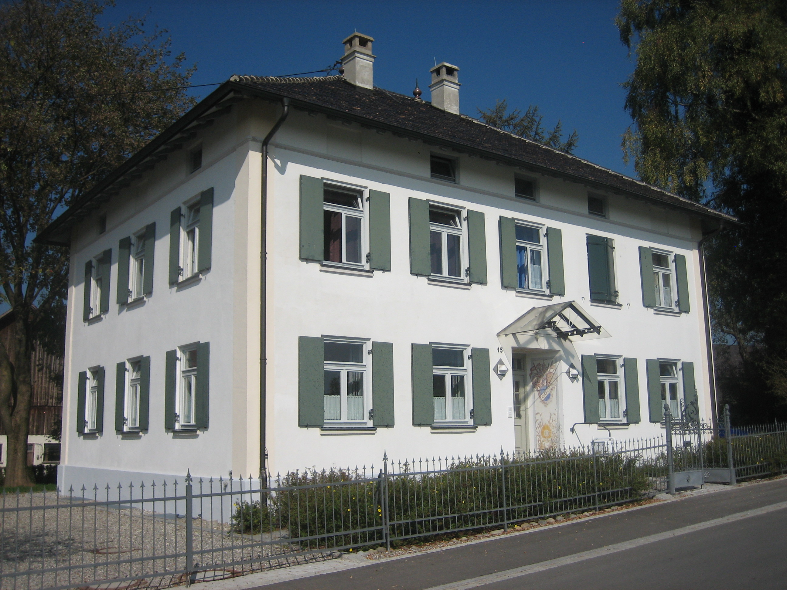 St. Afra, Gemeinde Lachen, Landkreis Unterallgäu, Bayern Pfarrhaus, Lachen, Landkreis Unterallgäu, Bayern